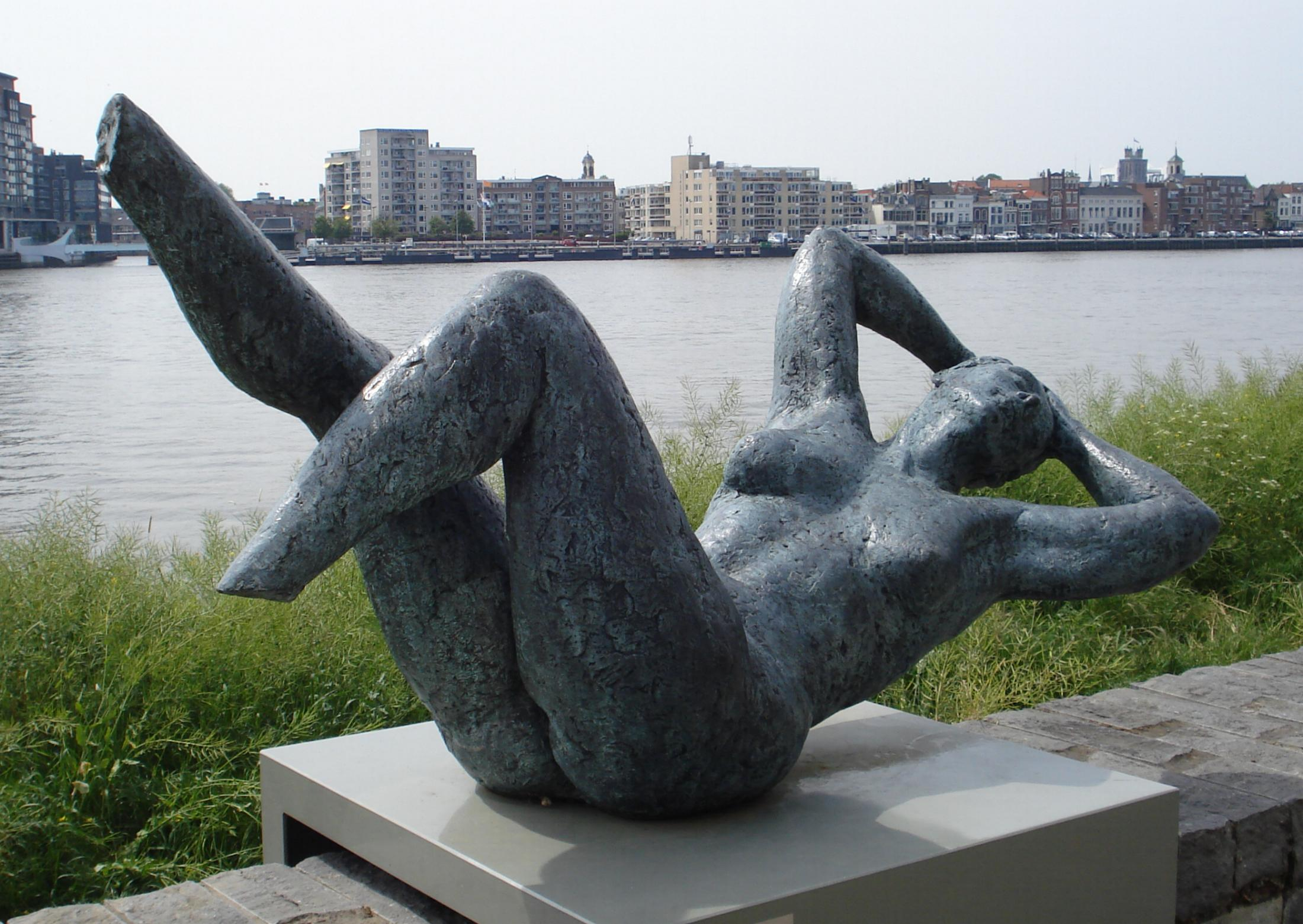 Beeldenboulevard Papendrecht, Merwehoofd. Kunstwerk "Volupté" van Maïte Duval.